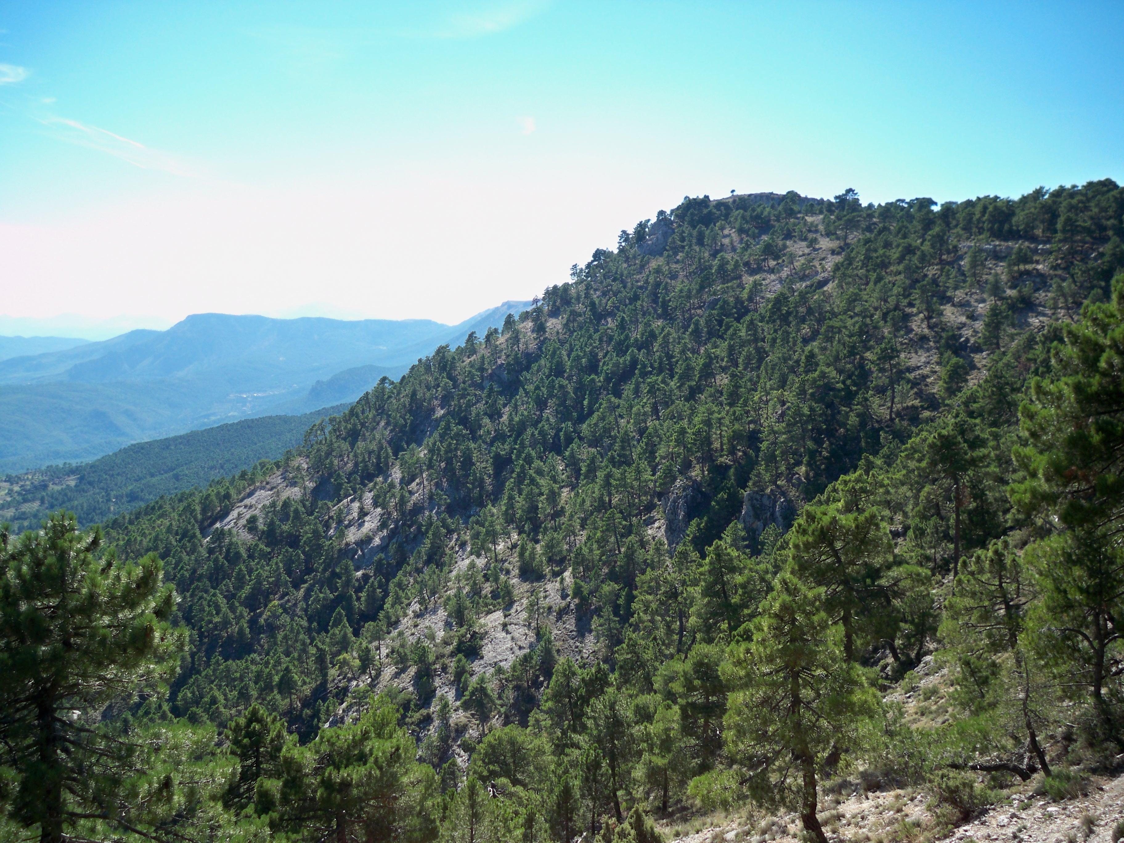 Monte de pinos cerca de Los Collados (Molinicos - Albacete), dentro del Parque Natural de los Calares del Río Mundo y de la Sima